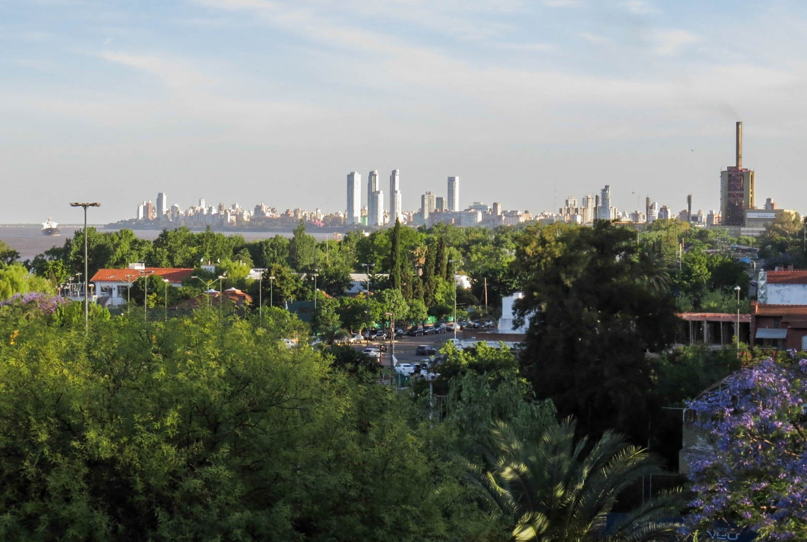 Vista de la Florida, desde la plaza Santos Dumont en Rosario.